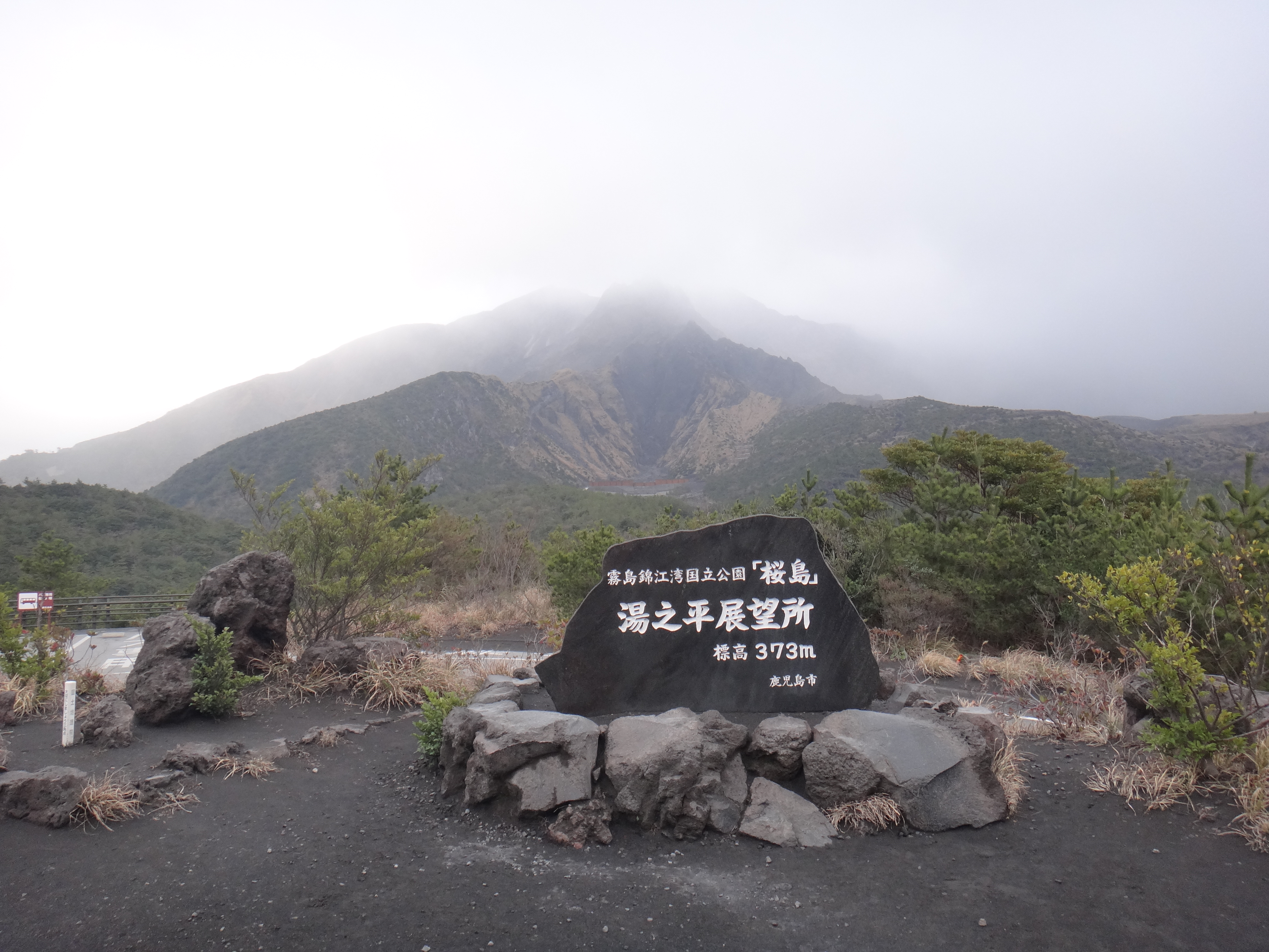 湯之平展望所からの桜島。